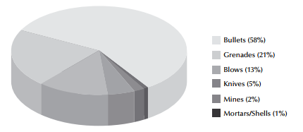 חלוקת השימוש בסוגי הנשקים במהלך המלחמה